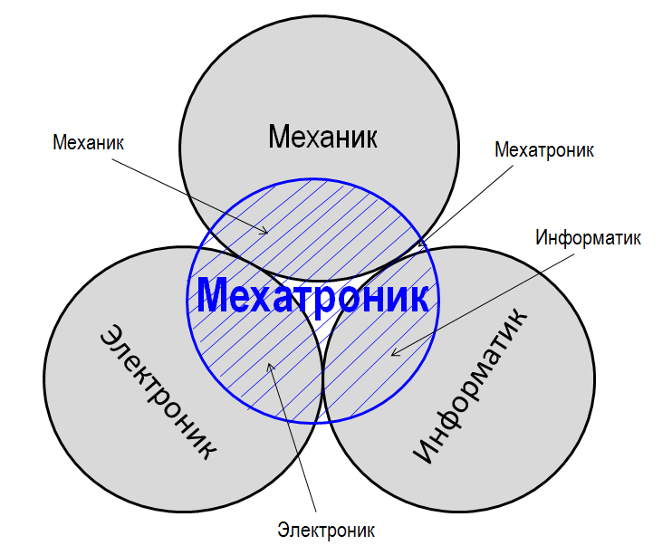 Монгол: Мехатроник